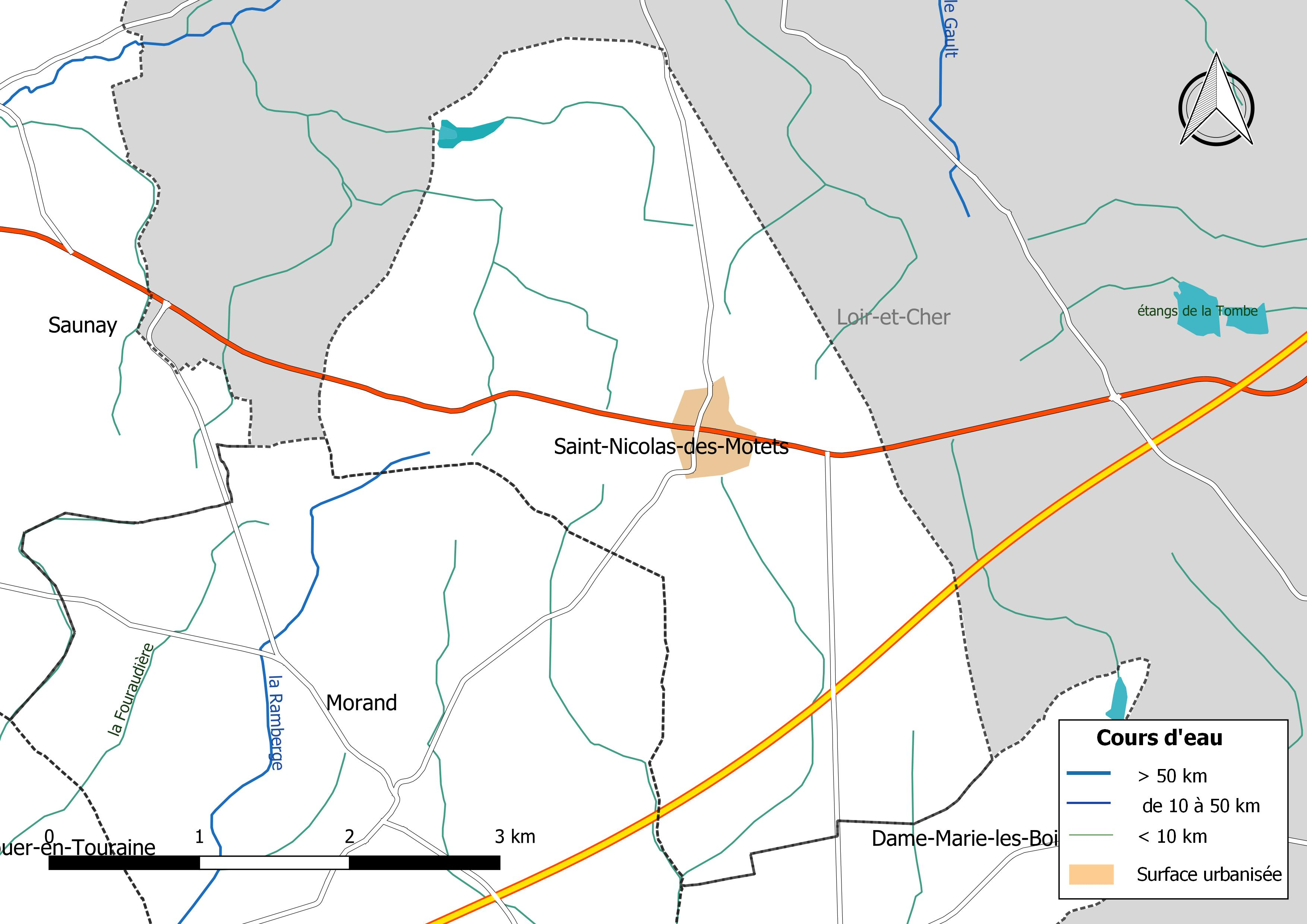 Carte du réseau hydrographique de la commune de Saint-Nicolas-des-Motets (France).